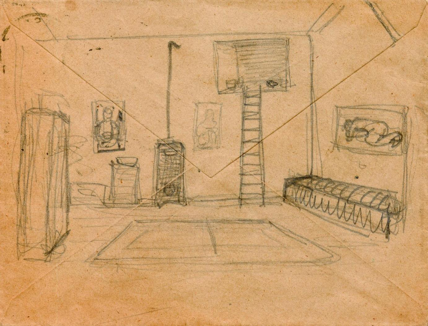 Skizze Paula Modersohn Beckers von ihrem letzten Pariser Atelier 1906